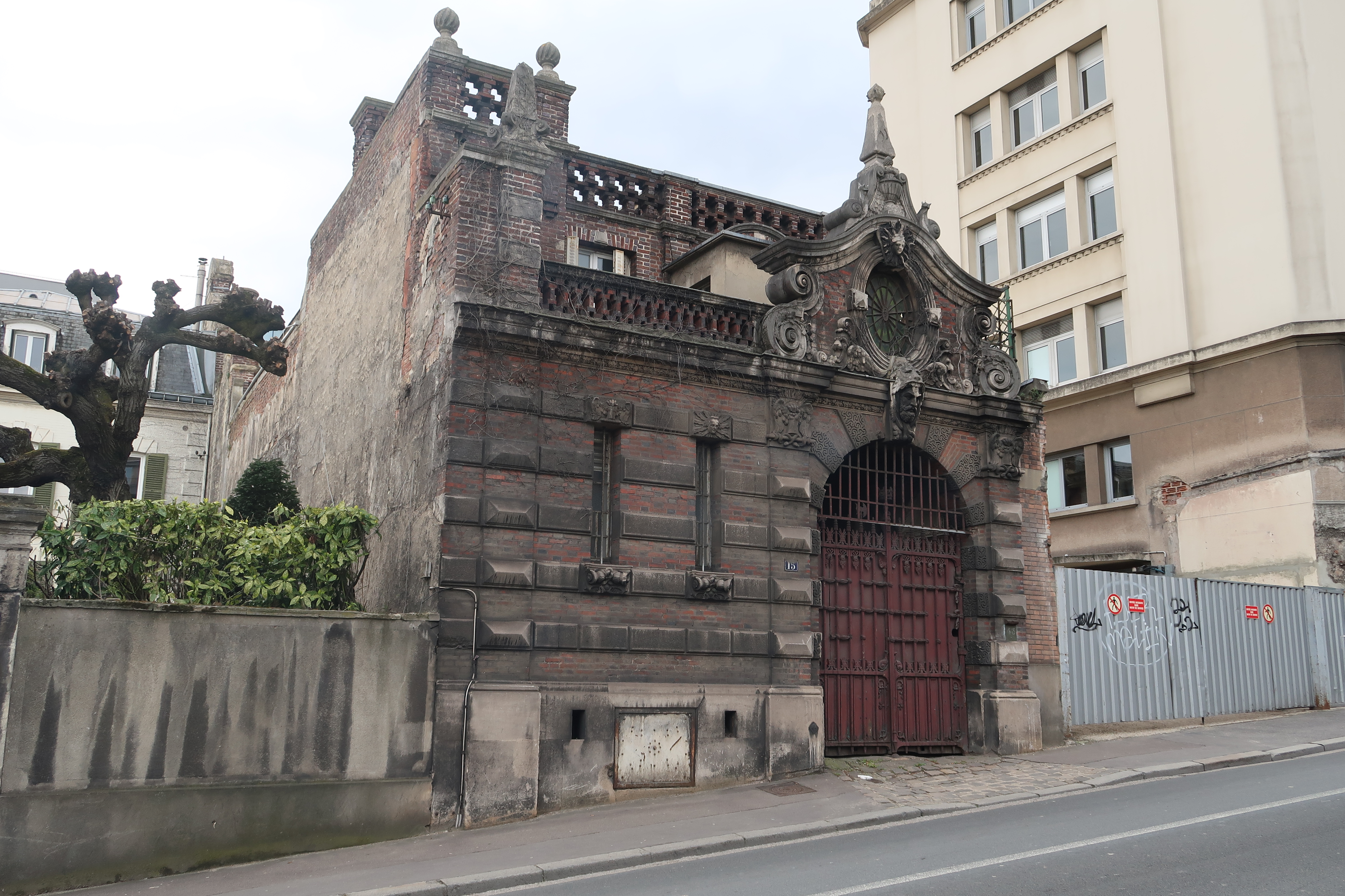 Vieille maison au n°15 avenue Franklin-Roosevelt à Suresnes (Hauts-de-Seine), dépendance de l'hôpital Foch.